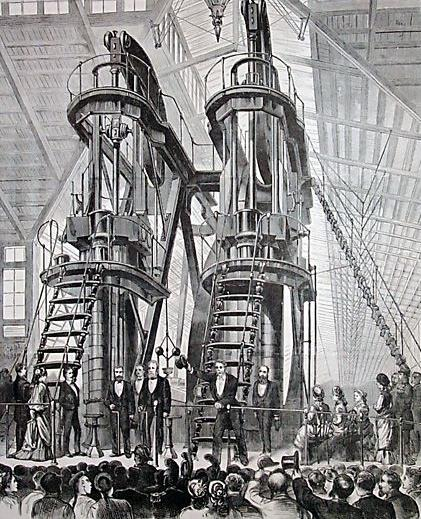 Presidente Ulysses S. Grant e Dom Pedro II do Brasil abrem a exposição de Filadélfia, Estados Unidos em 1876. U.S. President Ulysses S. Grant and Emperor Pedro II of Brazil starting the Corliss Centennial Engine at the opening ceremonies of the Centennial Exposition in Philadelphia, 1876.